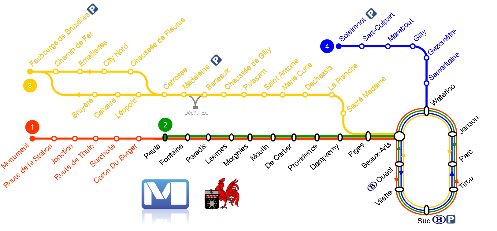 Mise à Jour plan métro 2012